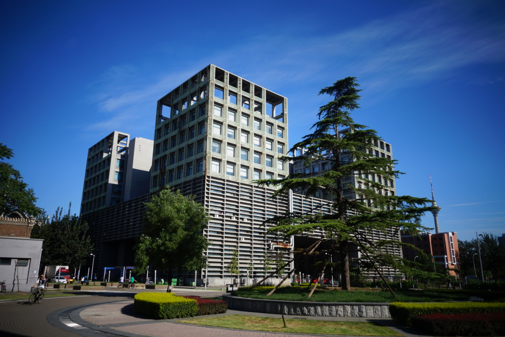 中文（中国大陆）: 天津大学南开大学联合研究大厦